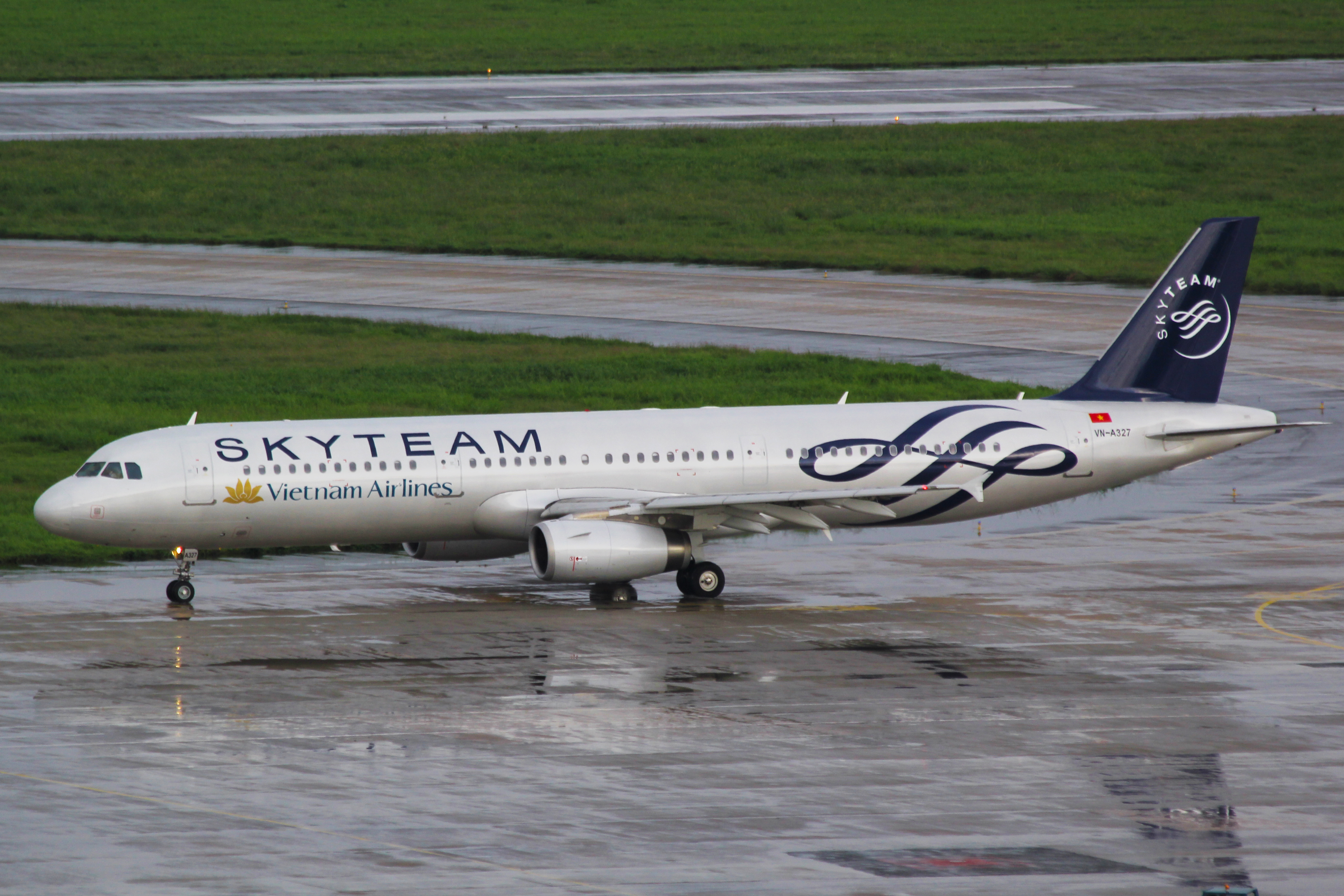 Vietnam Airlines Airbus A321-231 VN-A327 Skyteam Livery